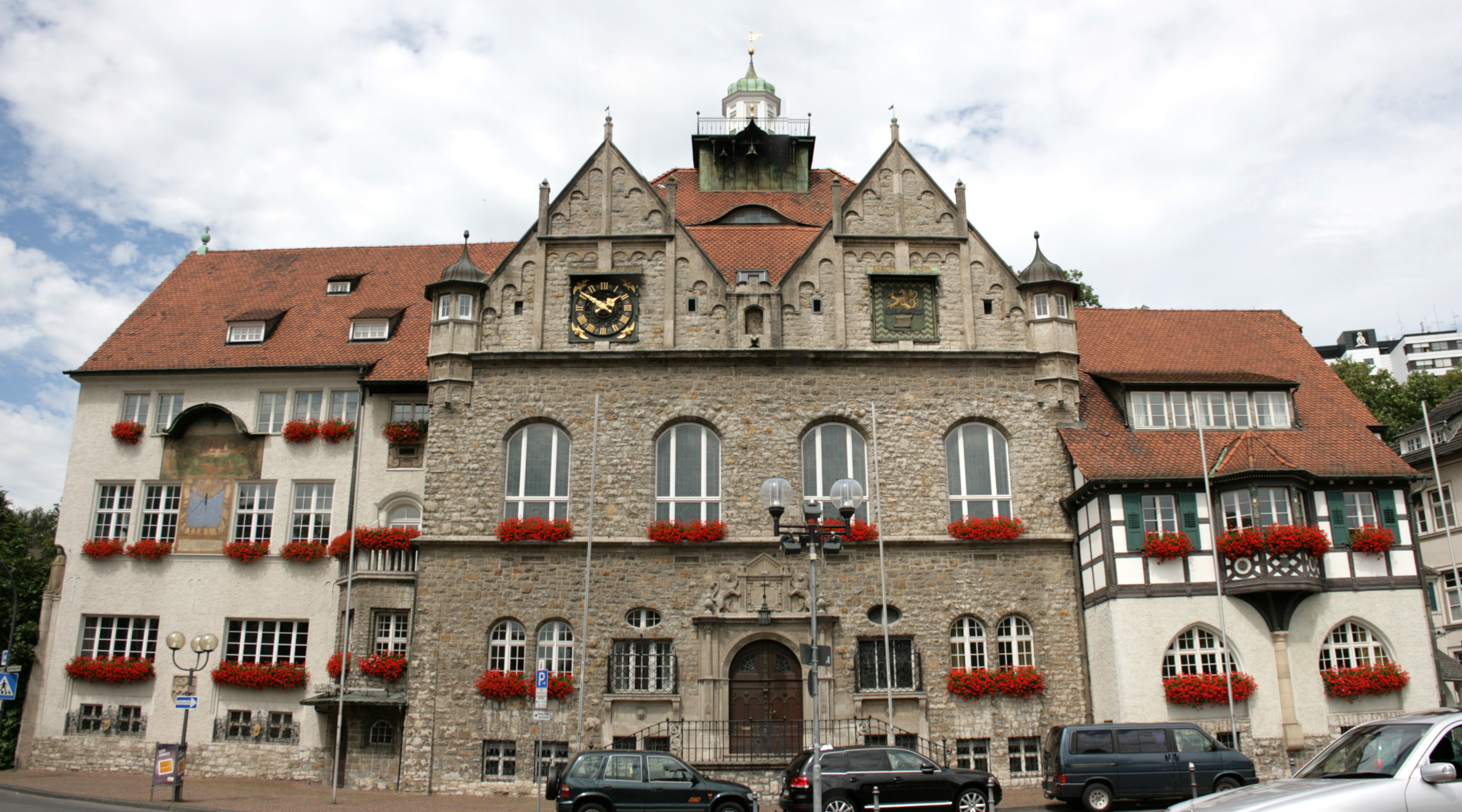 Altes Rathaus am Konrad-Adenauer-Platz in Bergisch Gladbach